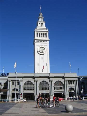 Сграда на пристанище Сан Франциско (Ferry Building), Калифорния, САЩ. (авторска снимка)